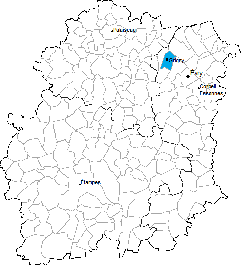 Carte de localisation du canton de Grigny en Essonne (91)